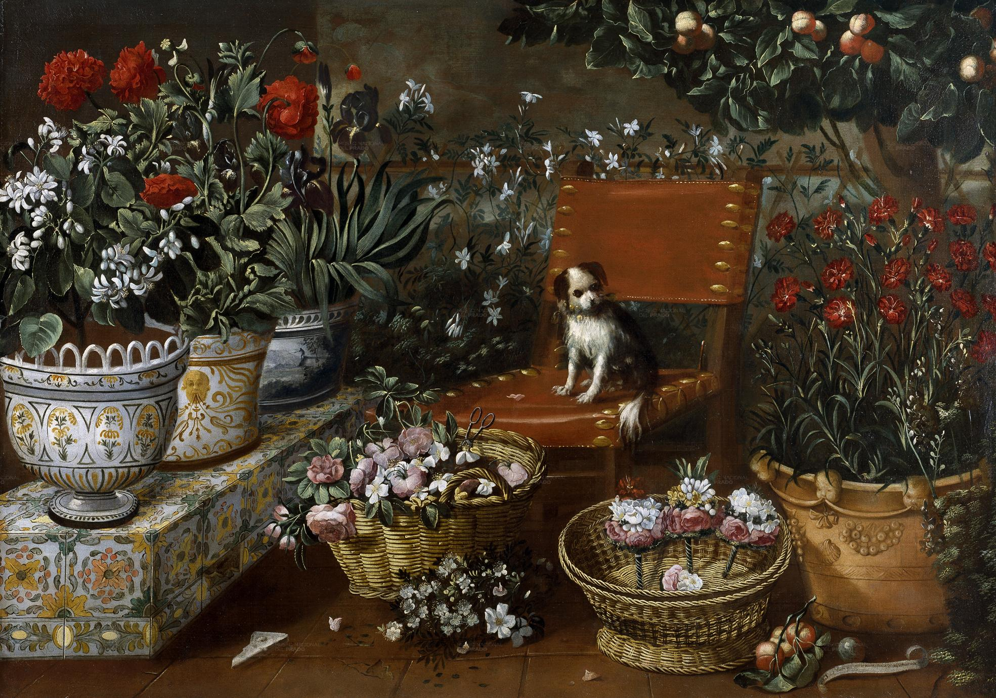 Rincon de jardin con un perrito